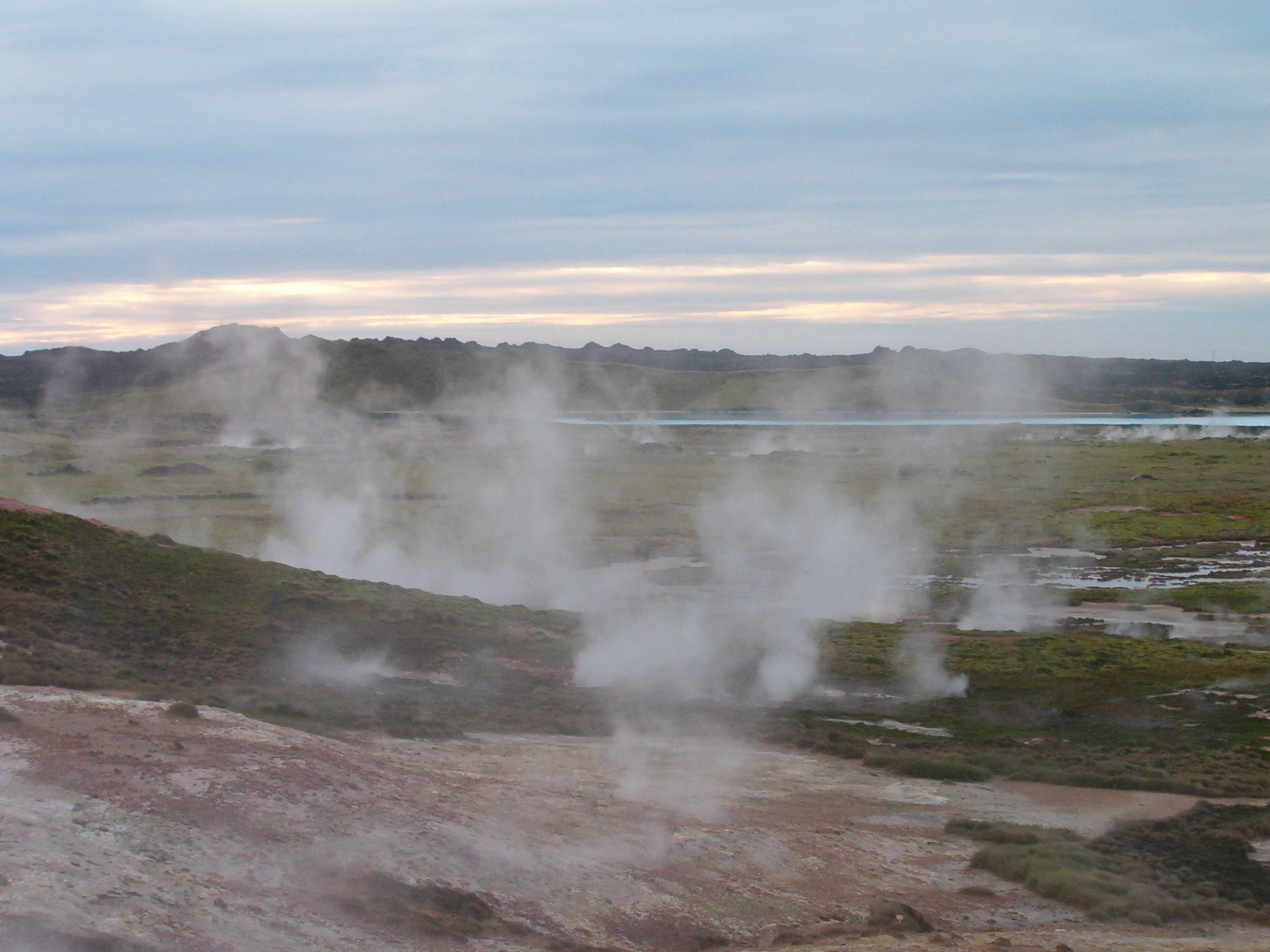 Nesjavellir am Þingvallavatn.